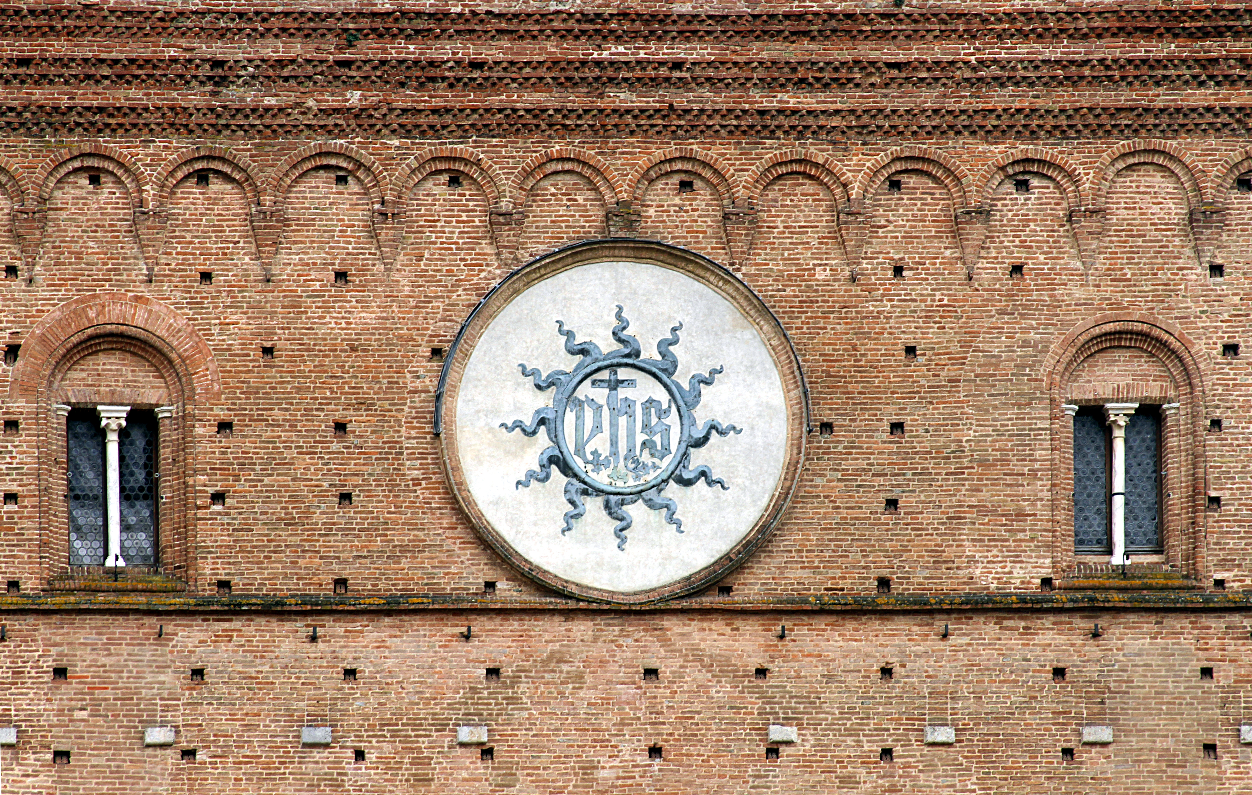 Piazza del Campo - Siena